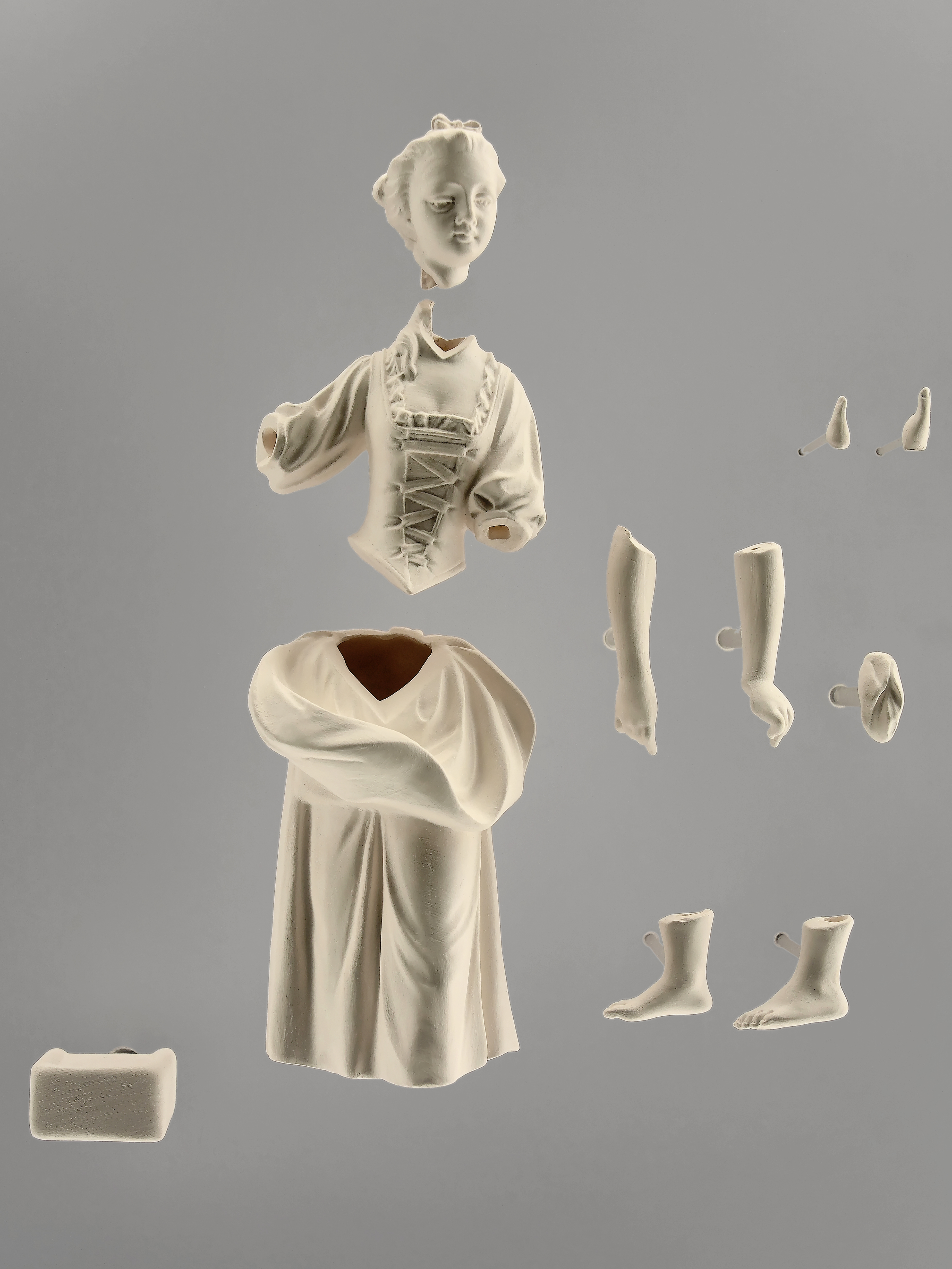 Impressionen vom Porzellanmuseum Schloss Fürstenberg Die Kaffeegesellschaft 1770 von Jean Jacques Desoches (Detail der unbearbeiteten Figur)